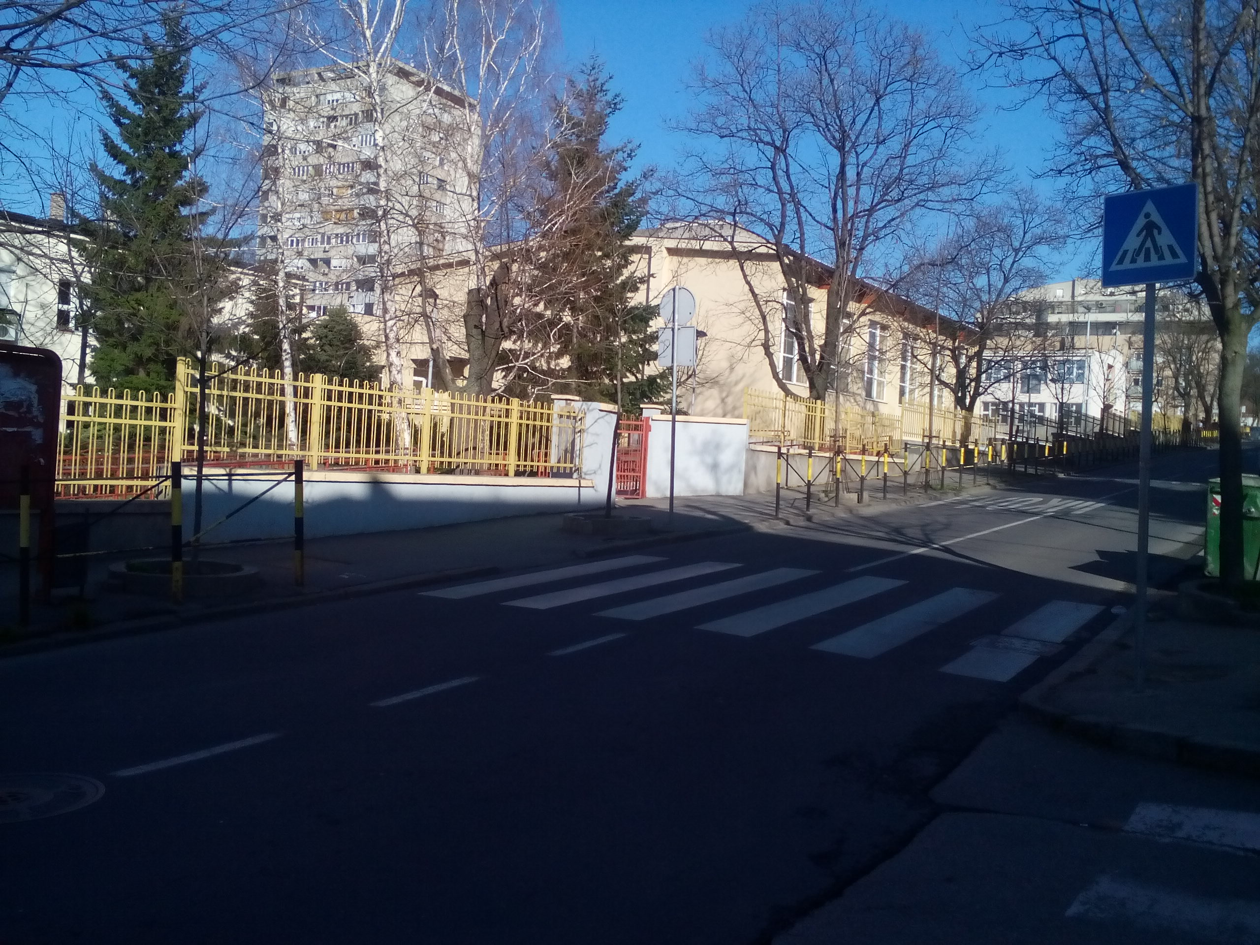 Pogled na OŠ "Veljko Dugošević"